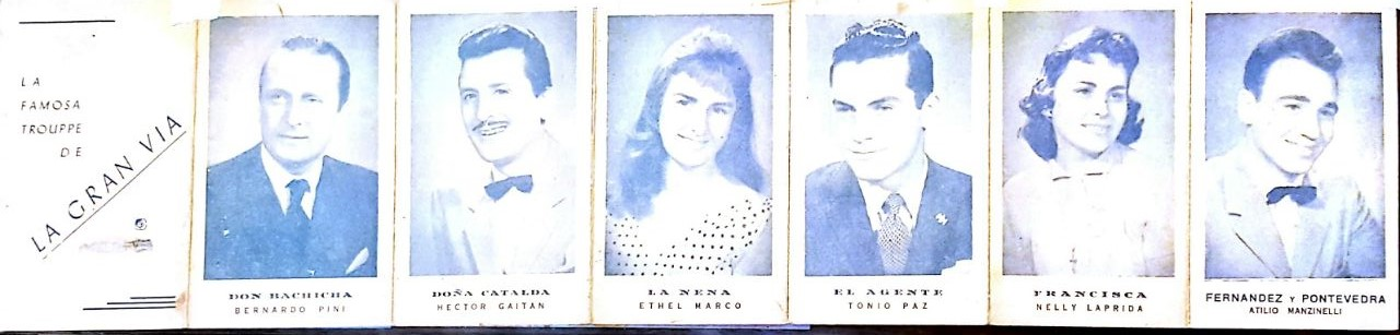 protagonistas de la trouppe de la Gran via radio Lv2 de Cordoba